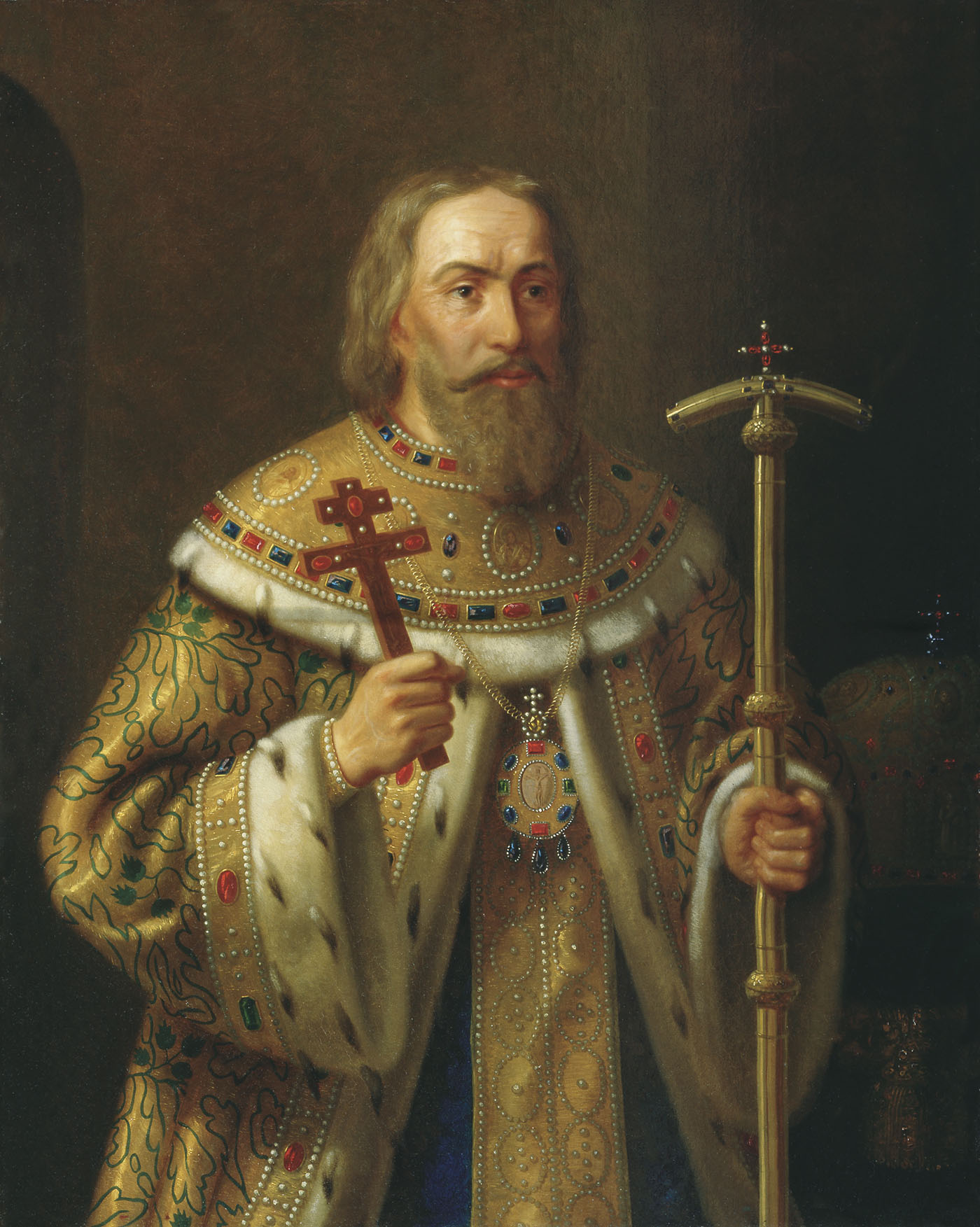 Portrait of Патриарх Филарет